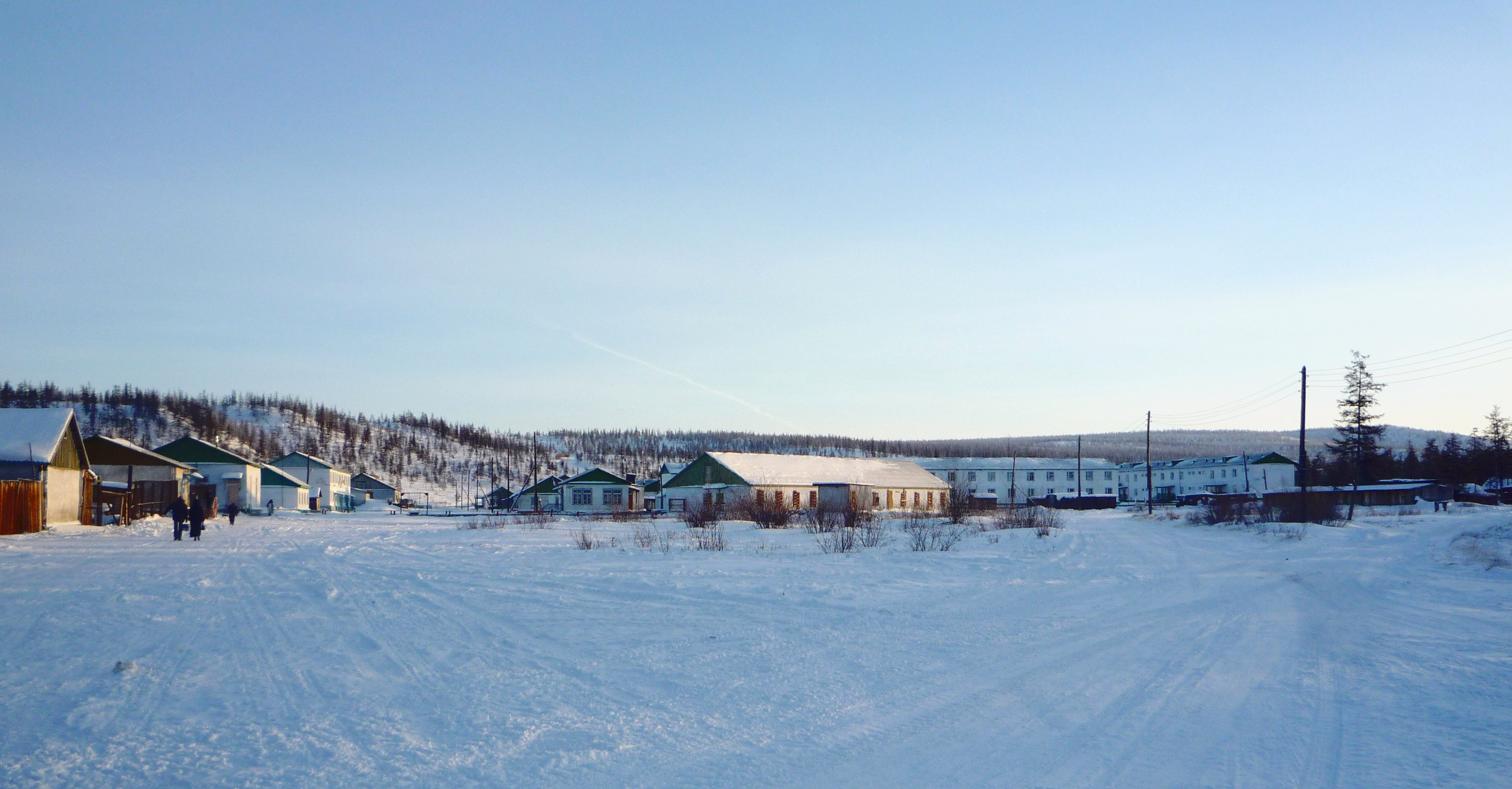 Cело Илирней